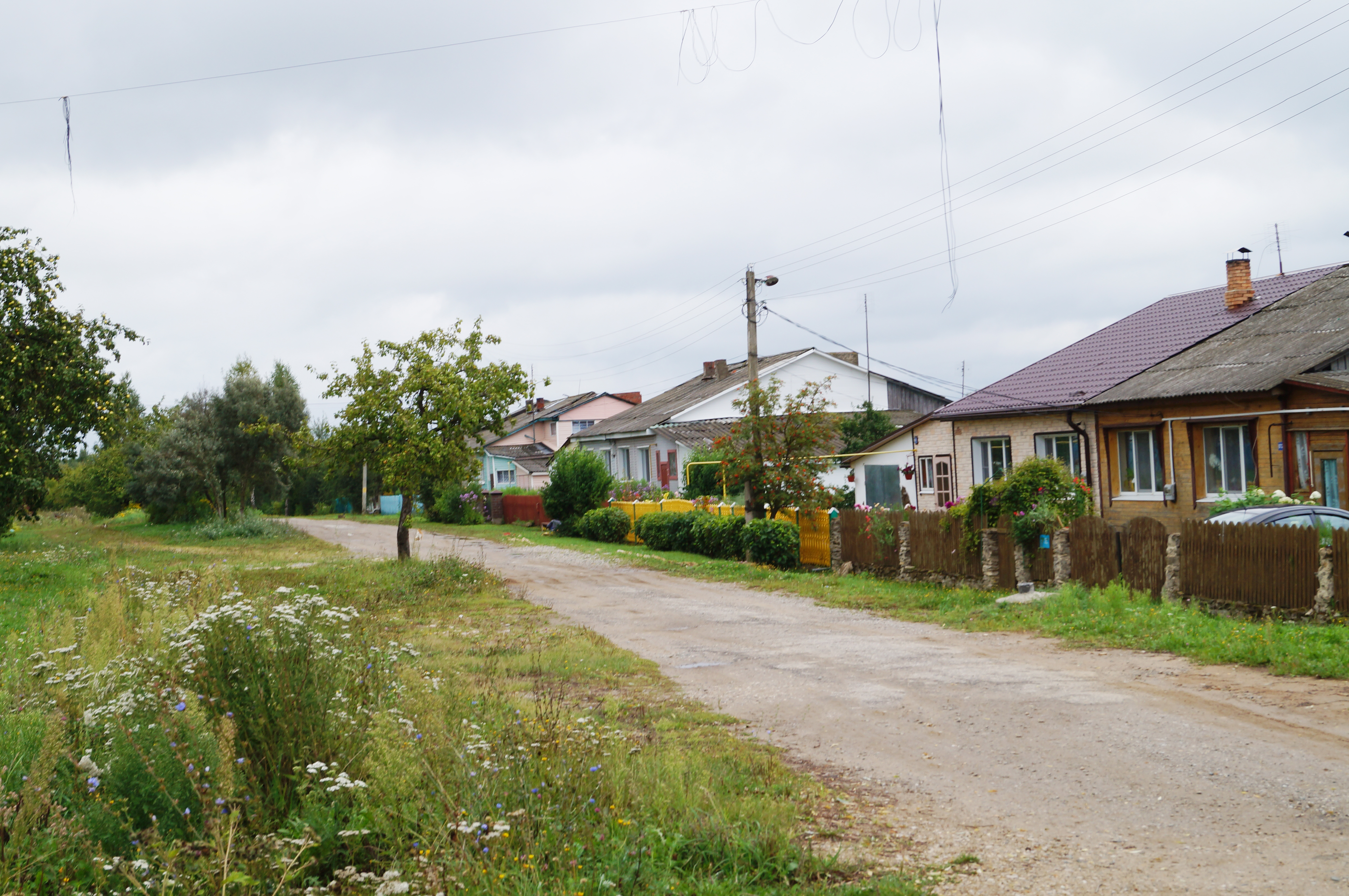 Маклаки (Думиничский район)